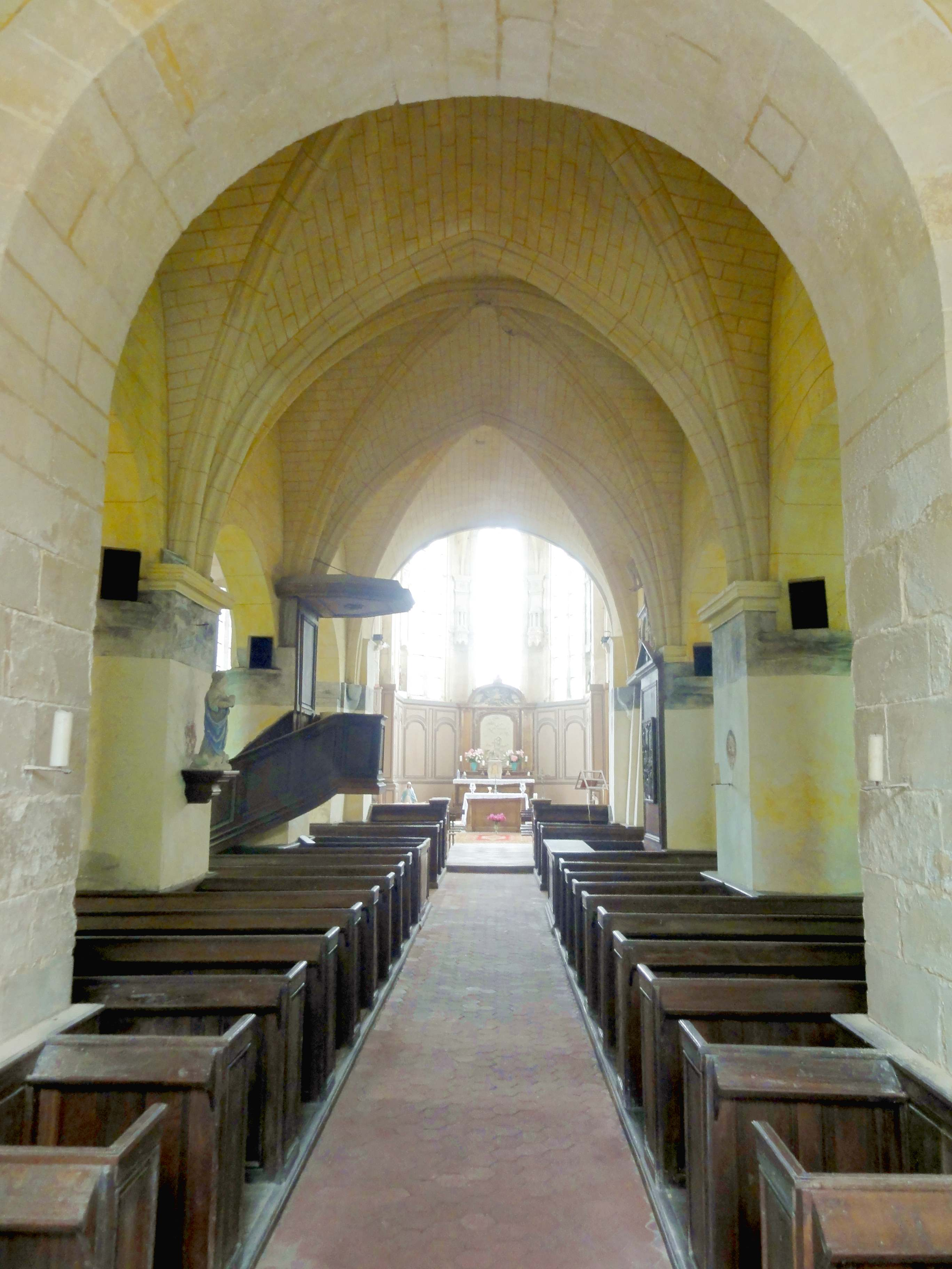 Nef, vue vers l'est.